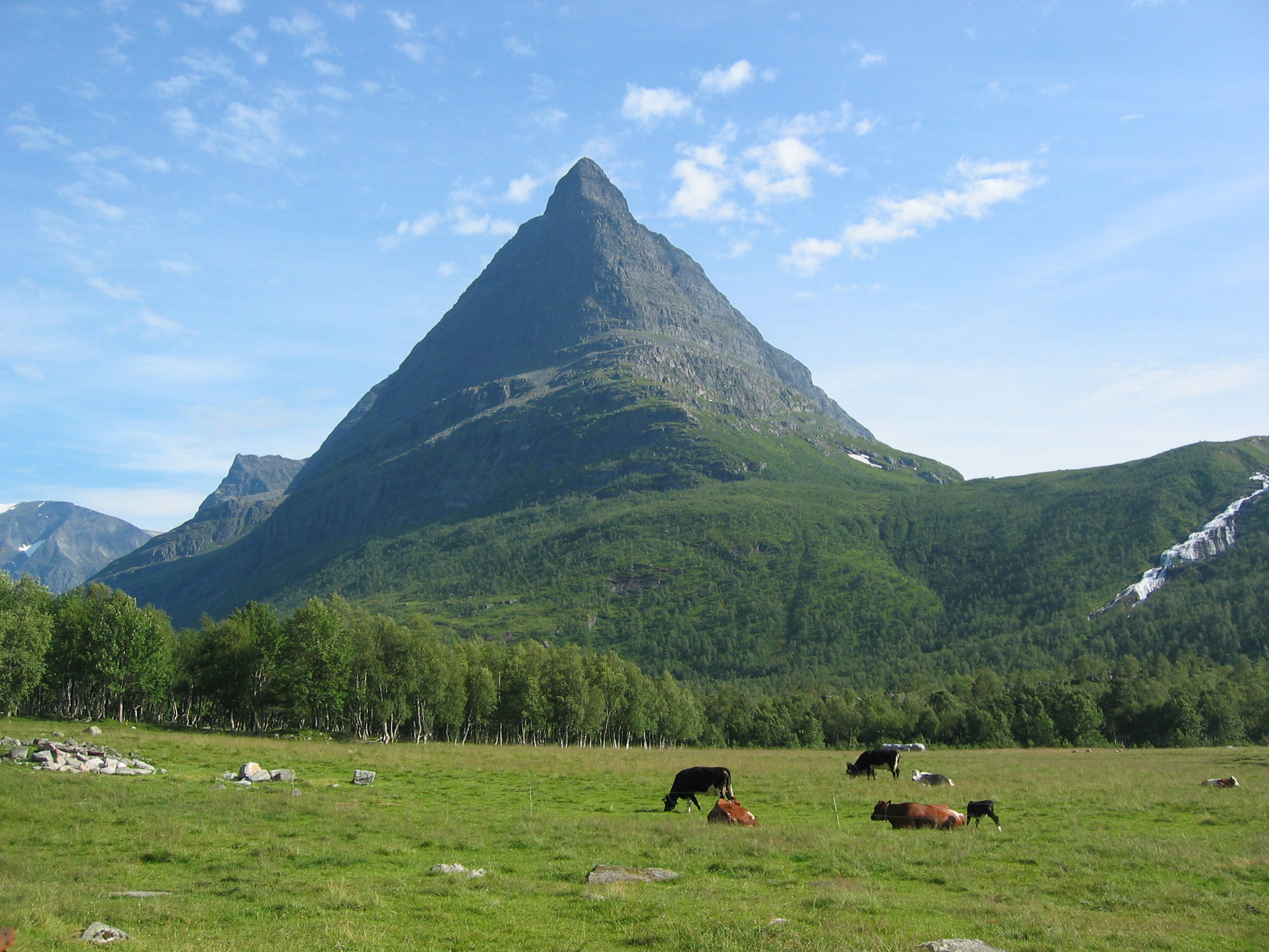 Innerdalstårnet, mountain in Trollheimen.